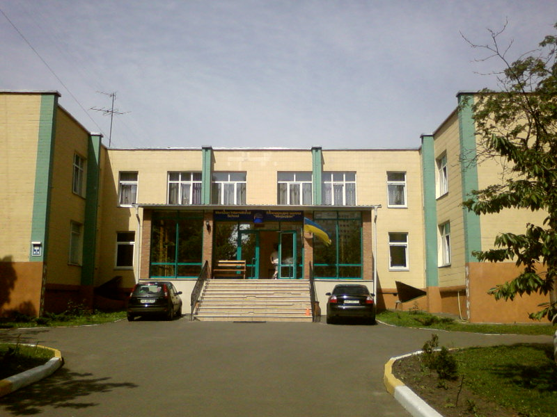 Школа Мередіан